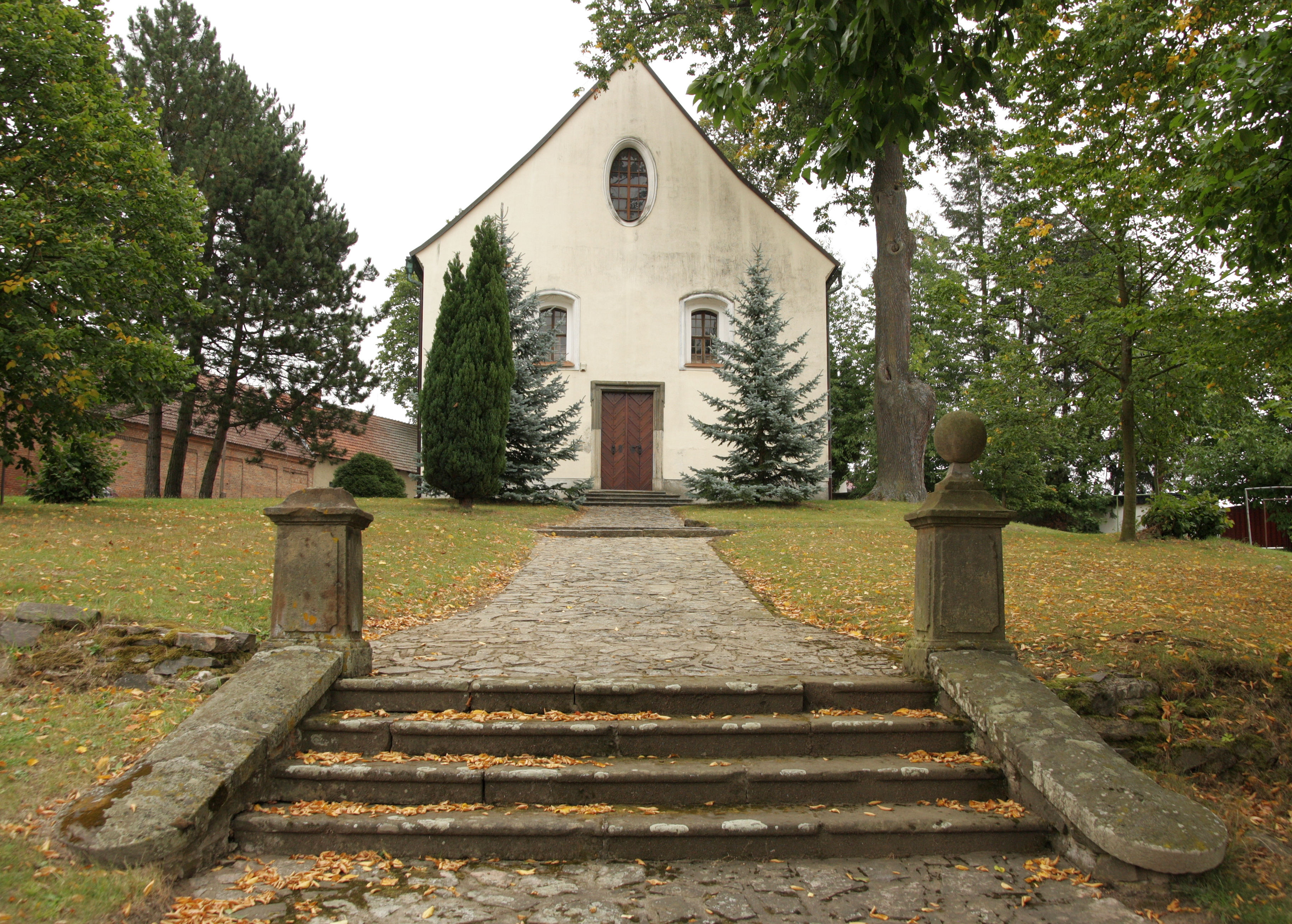 Křižanov (okres Žďár nad Sázavou) - kaple svaté Barbory